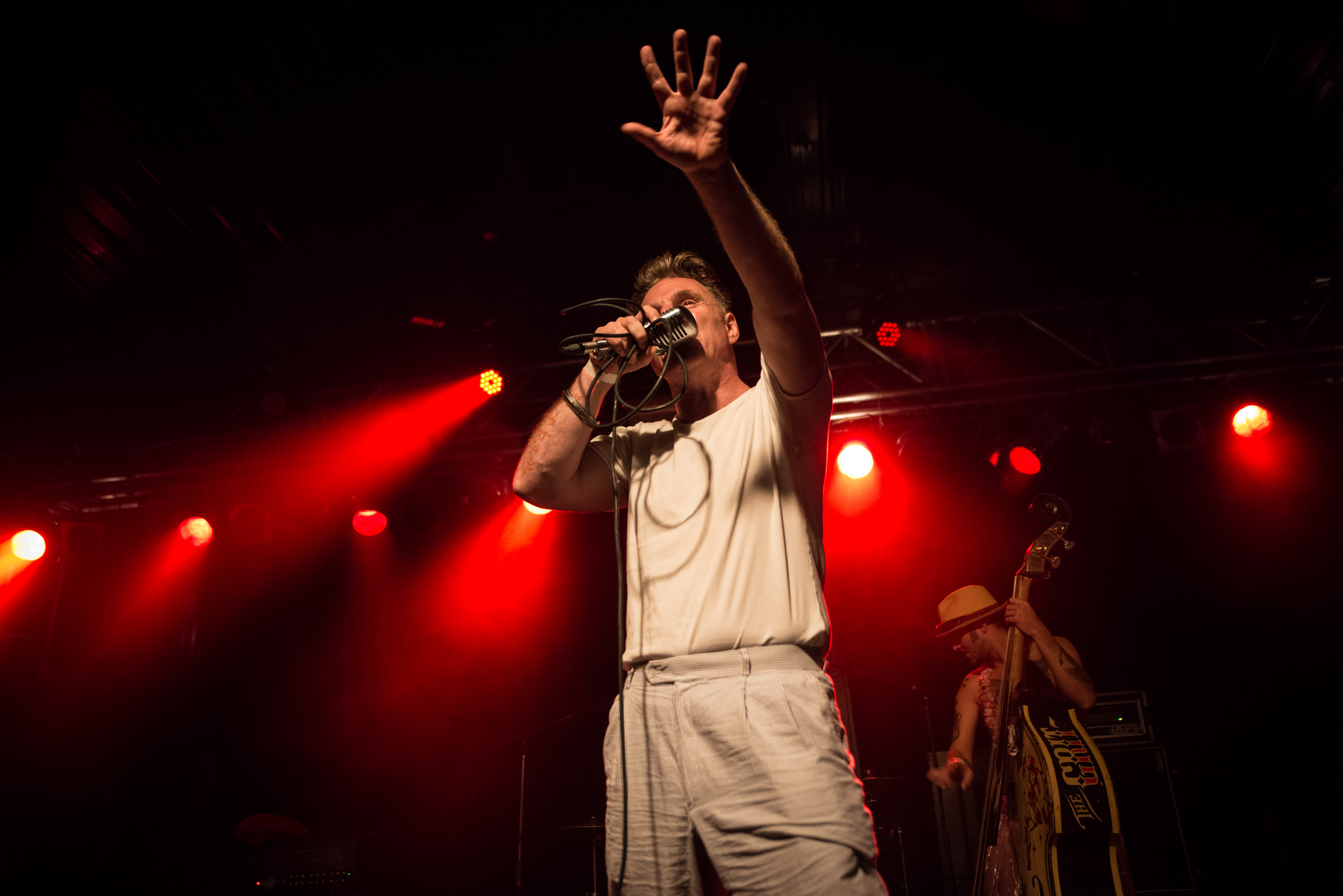 de